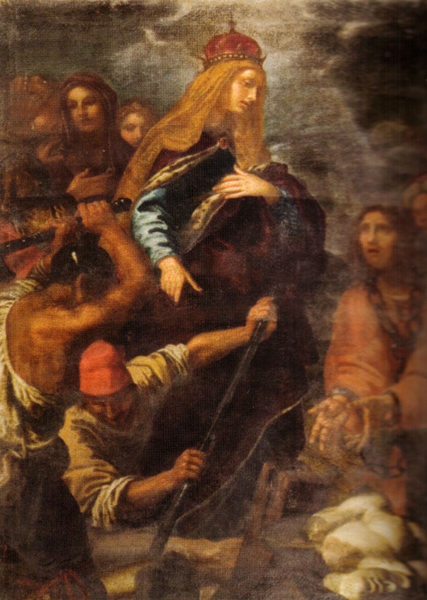 Giovanni bilivert, sant'elena che guida gli scavi per il ritrovamento della santa croce